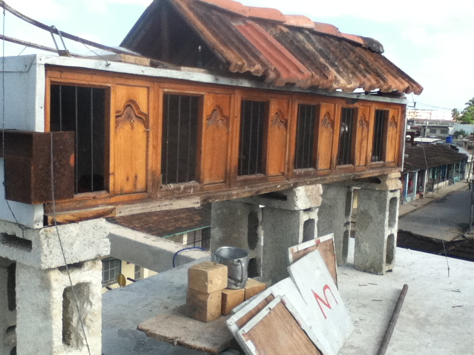 is palomar